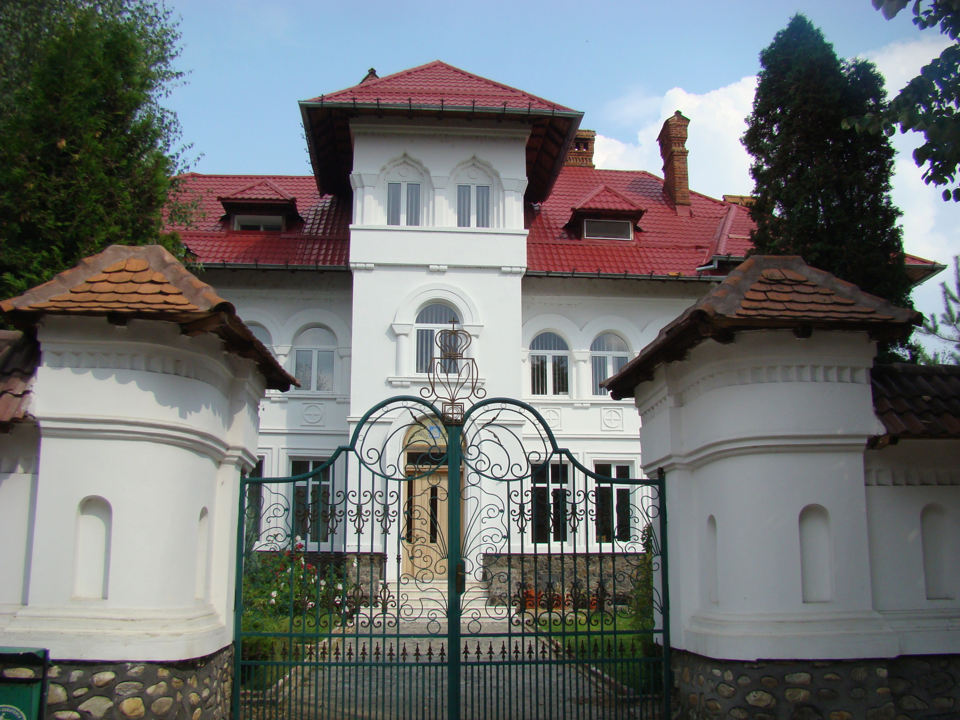 Protoieria orașului Curtea de Argeș